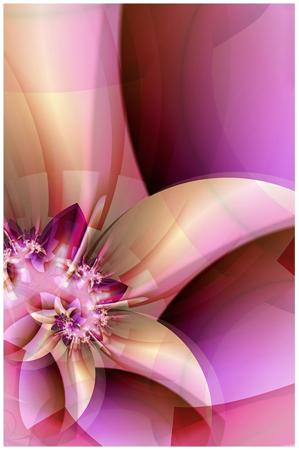 Fraktalkunstwerk von Sebastian Baumer